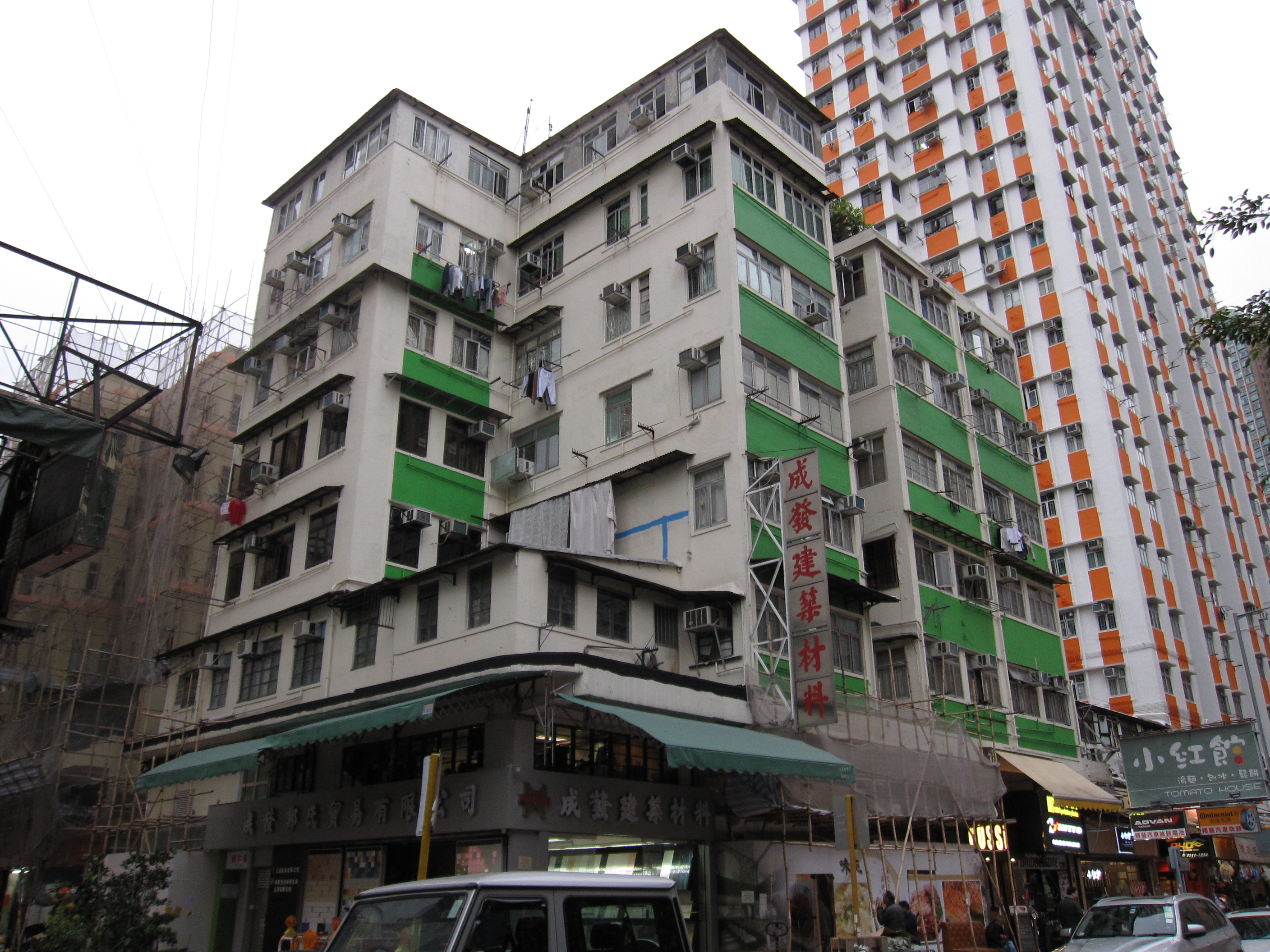 中文（香港）: 德仁樓第十五期。